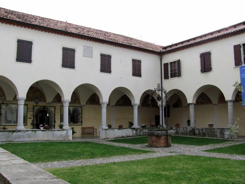 Abbazia di Rosazzo (UD) - il chiostro